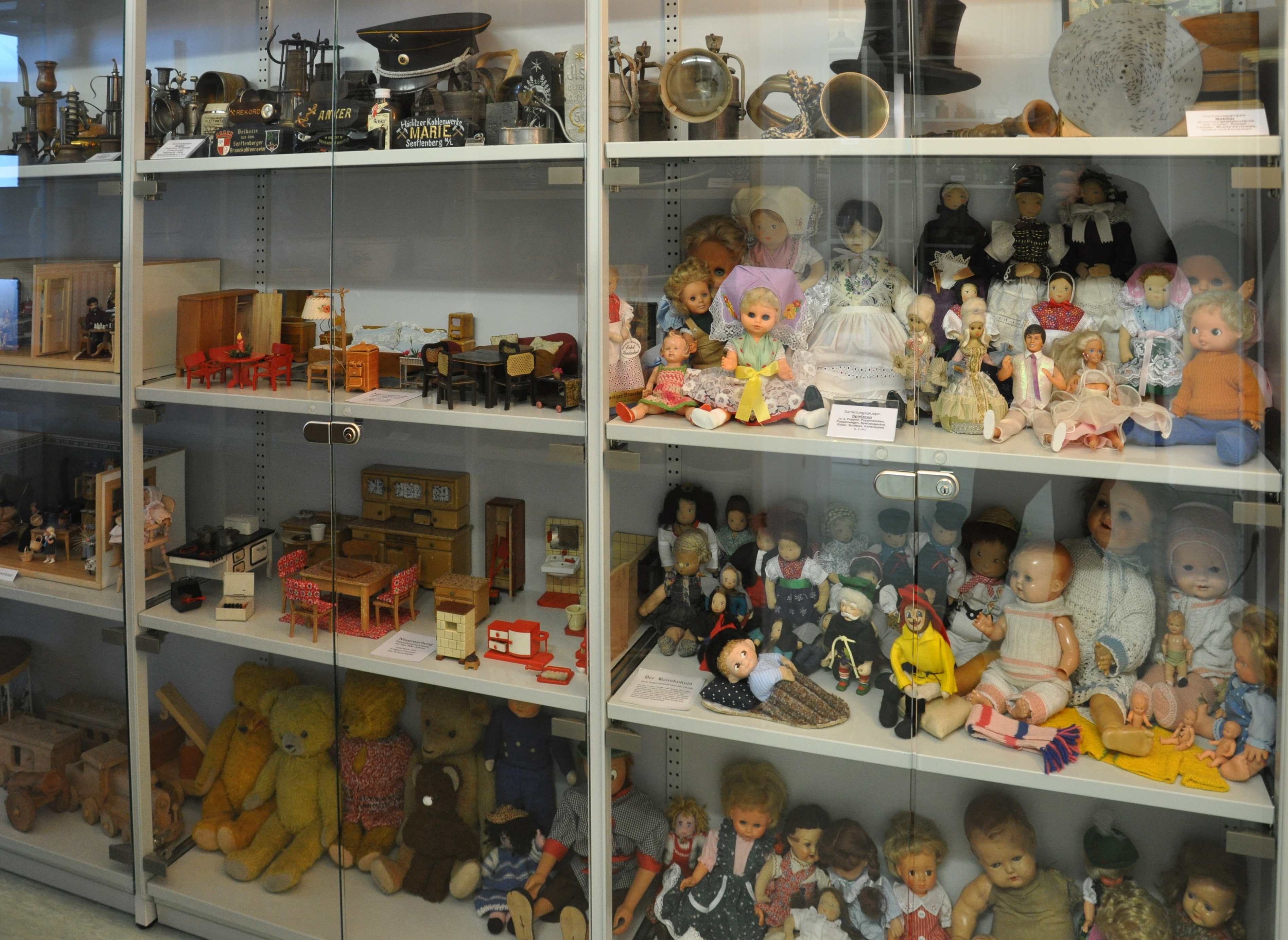 Museum Senftenberg (im Schloss Senftenberg) Schaudepot (hier: Spielzeug)